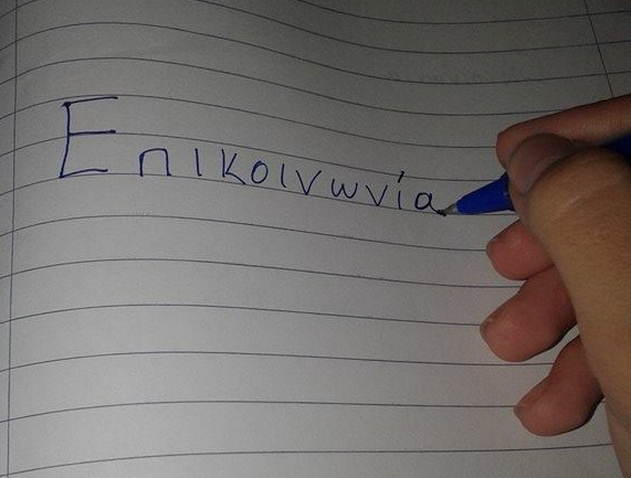 Komunikacija - grščina